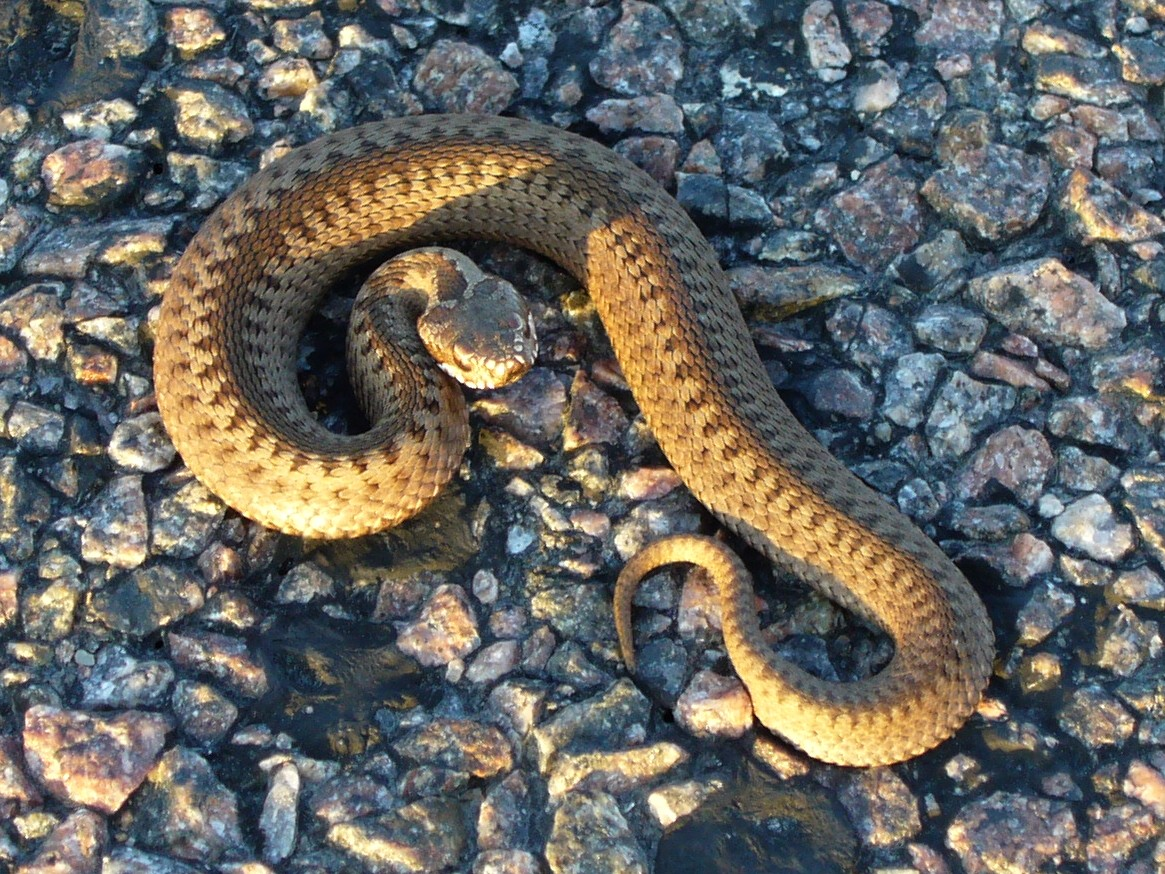 A small Vipera berus (common European viper) on asphalt. Nõmmküla village, Muhu island, Estonia.